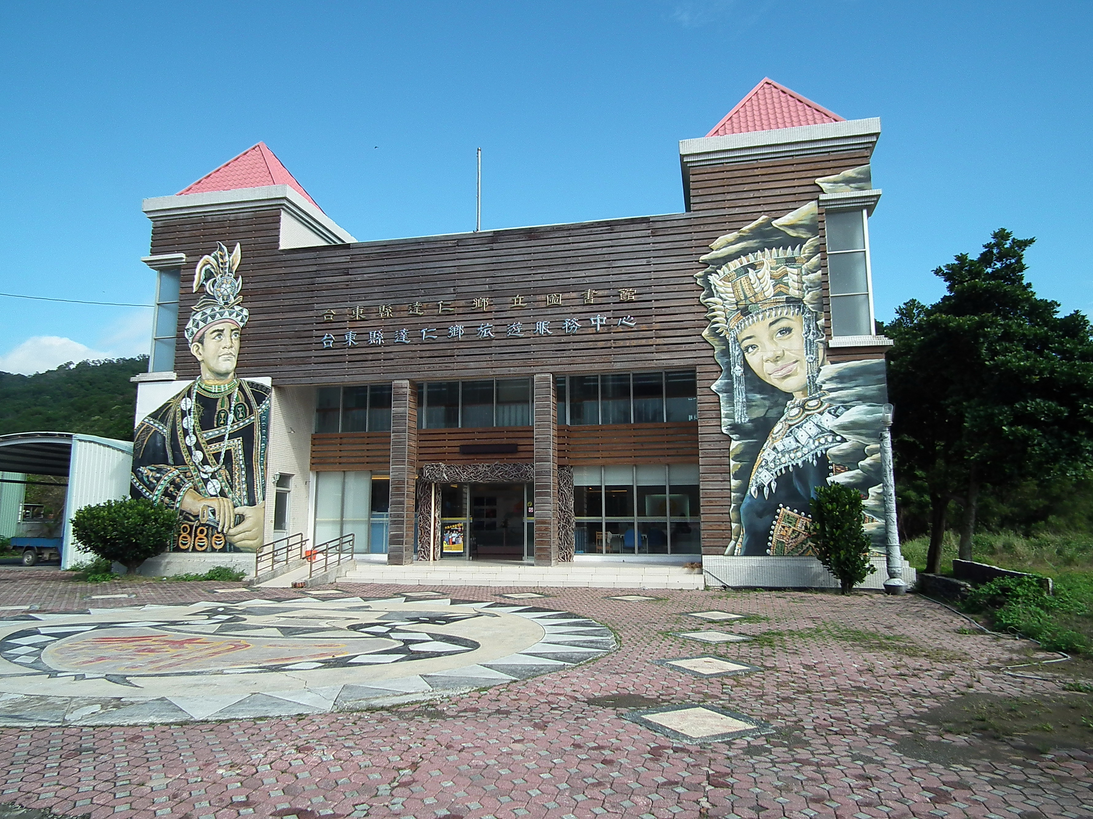 臺東縣達仁鄉立圖書館、臺東縣達仁鄉旅遊服務中心。